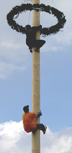 Maibaumkraxler - fotografiert bei Bad Füssing in Niederbayern 2004 Copyright Status: GNU Freie Dokumentationslizenz